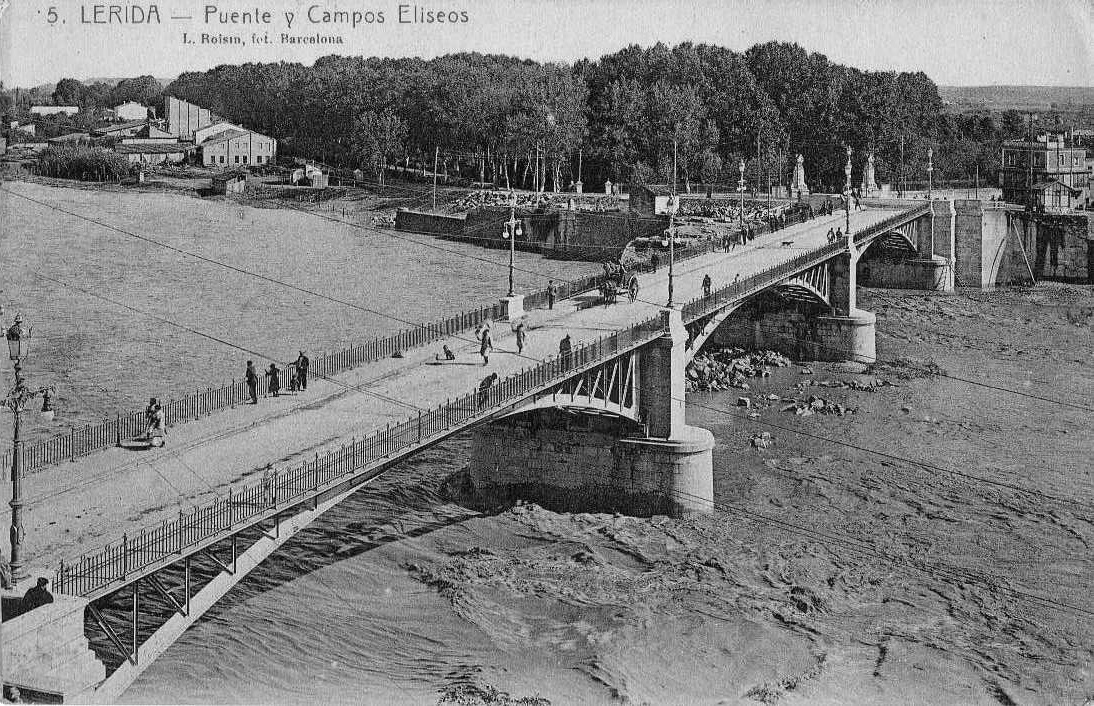 Vista des de La Banqueta, amb els Camps Elisis a l'altre costat